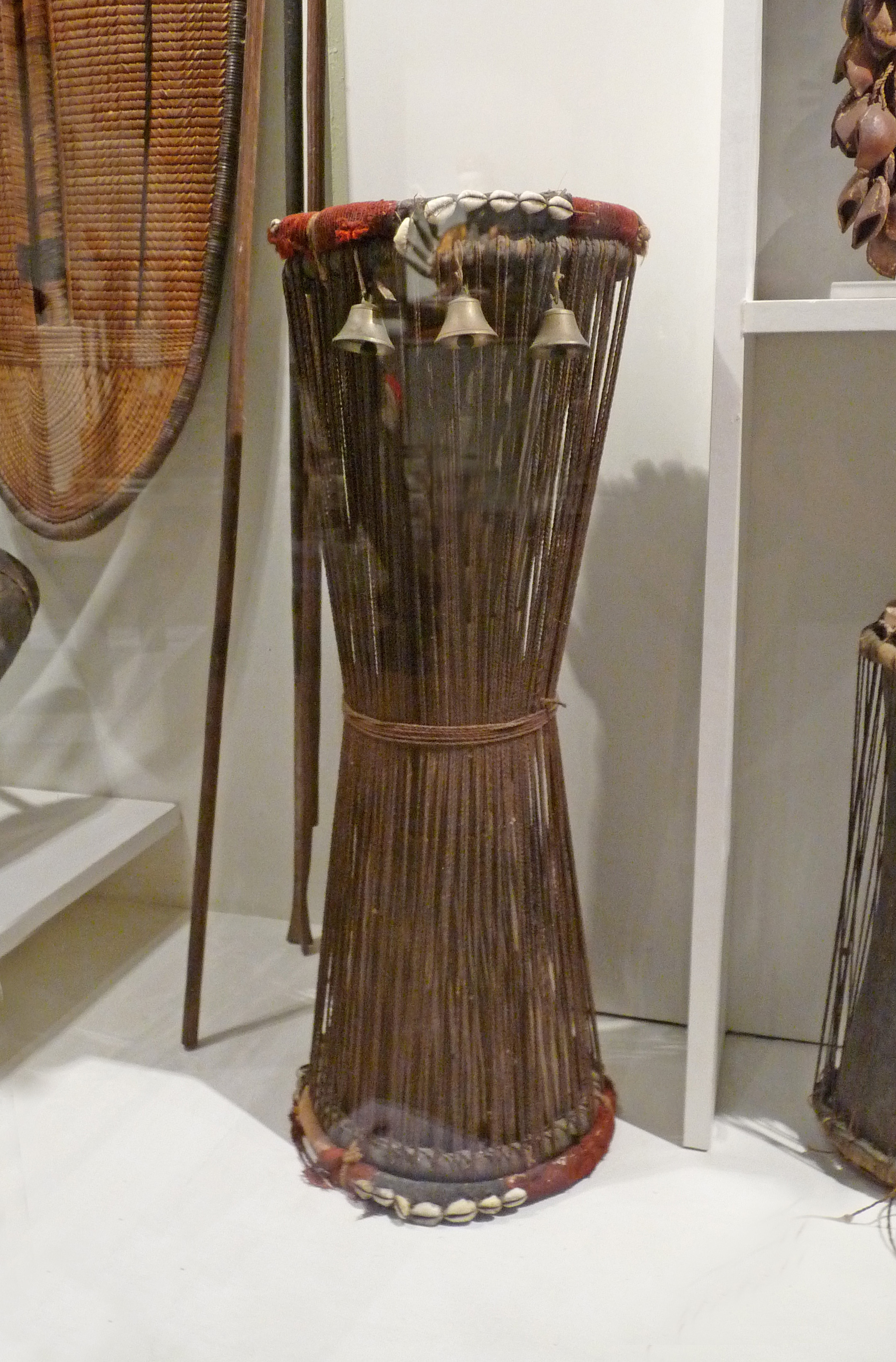 Tambour du Sénégal. Bois, peau, étoffe, métal, coquillages. Musée barrois (dépôt du Musée-aquarium de Nancy).